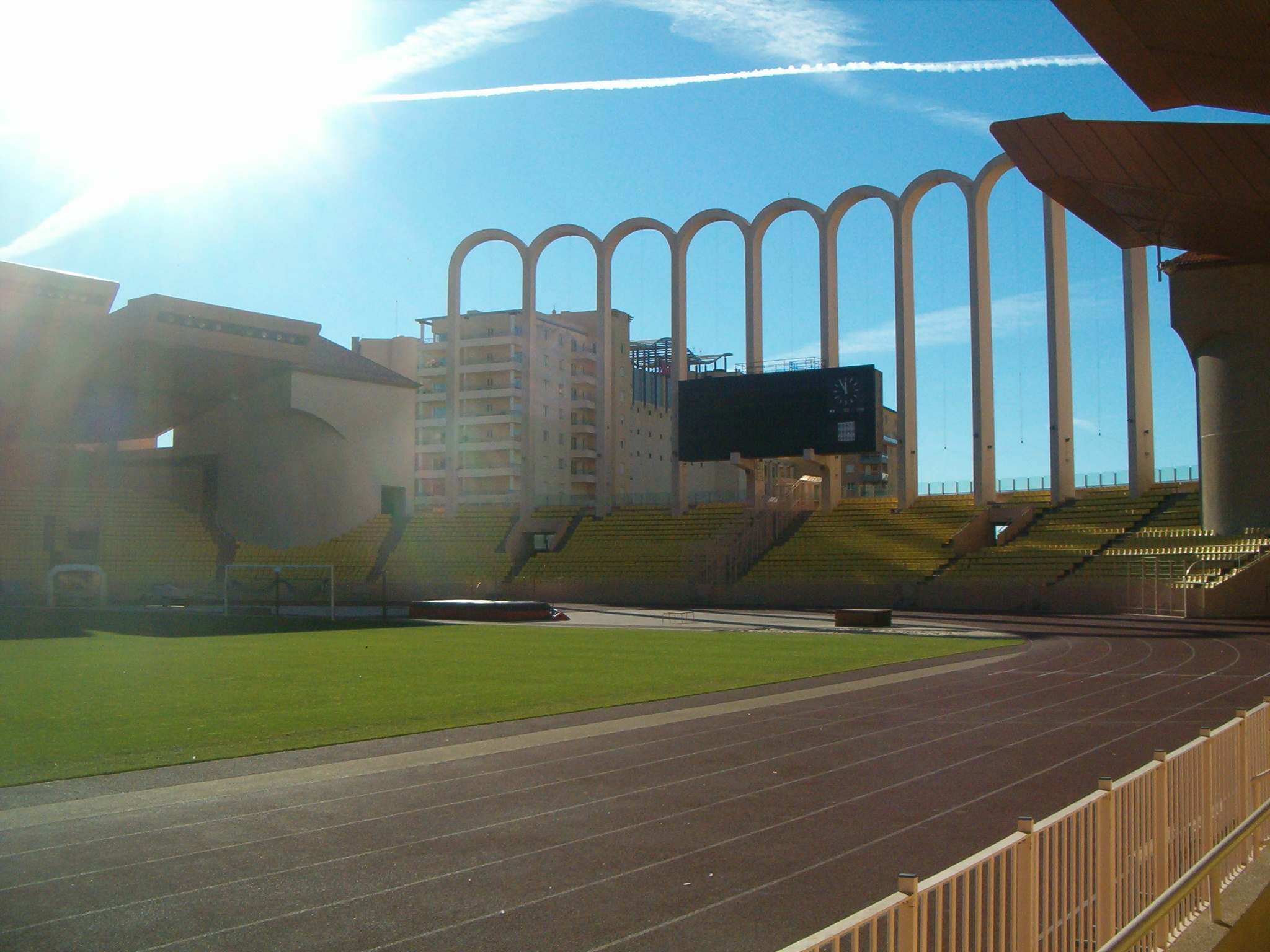 Stade Louis II (le 3 "M")